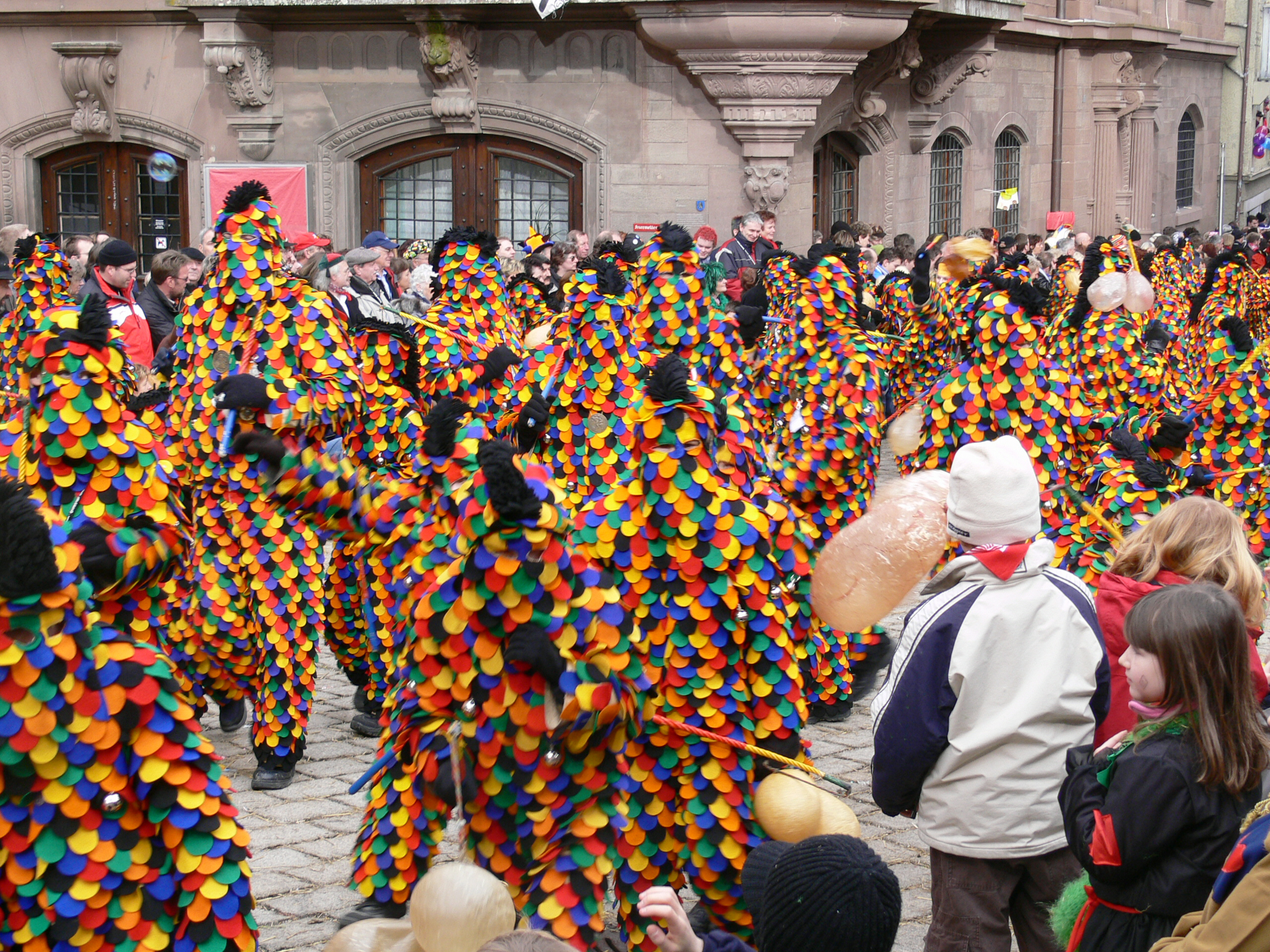 Narrengericht zu Stocken (Stockach), Figur: Hänsele Veranstaltung: Narrensprung beim Narrentreffen Meßkirch 2006